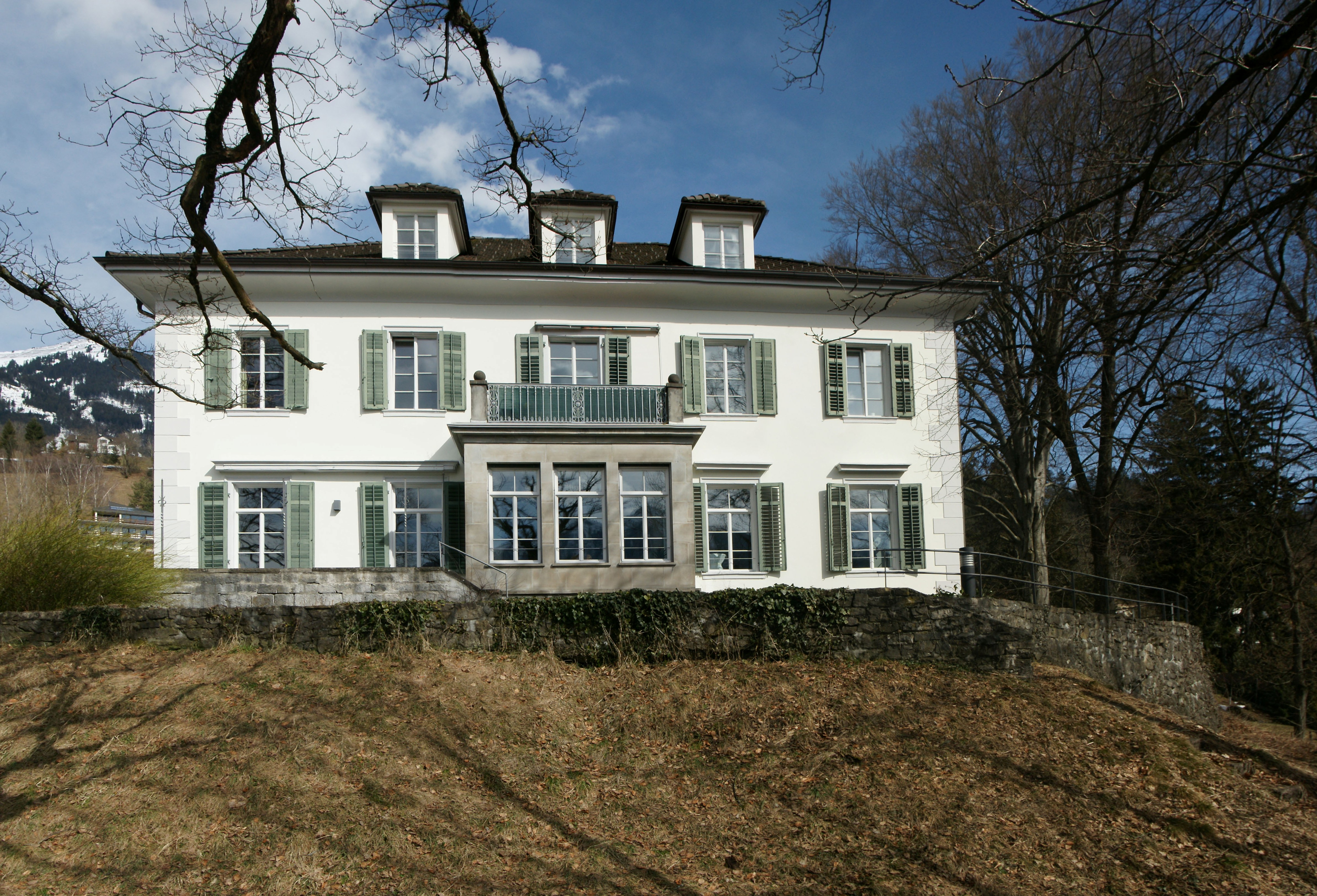 Flugelin Nr.3 in Thüringen, Vorarlberg. “Ansitz Falkenhorst” Geburtshaus von John Sholto Douglass 1838 sowie dessen Sohn George Norman Douglas 1868. Die Villa Falkenhorst wurde 1837 von John und seiner Frau Jane Douglass erbaut. Einfacher, englischer Landhausstil in Anlehnung an die italienische Renaissance